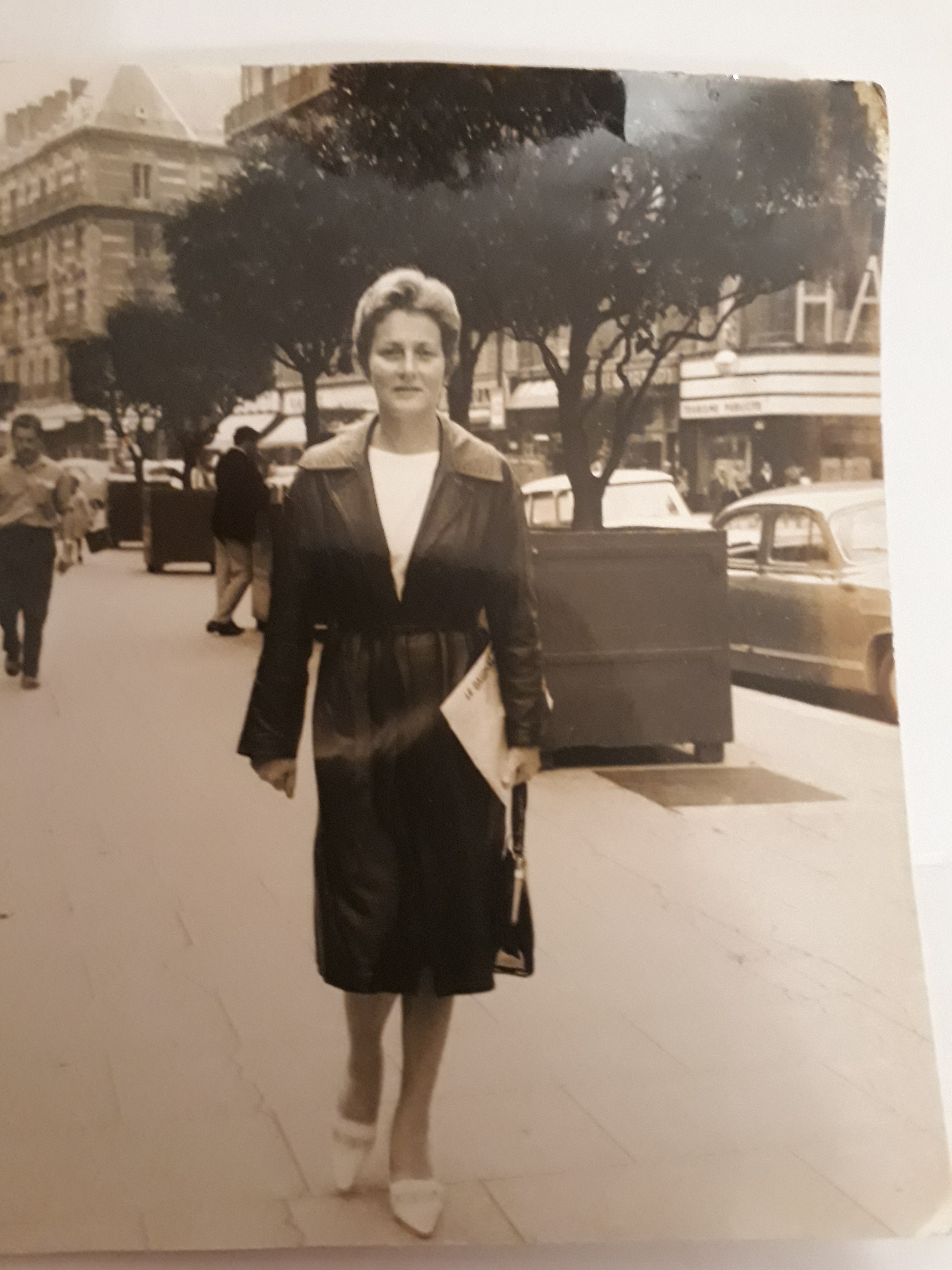 Catherine Claude au début des années 60 (photo de photo)